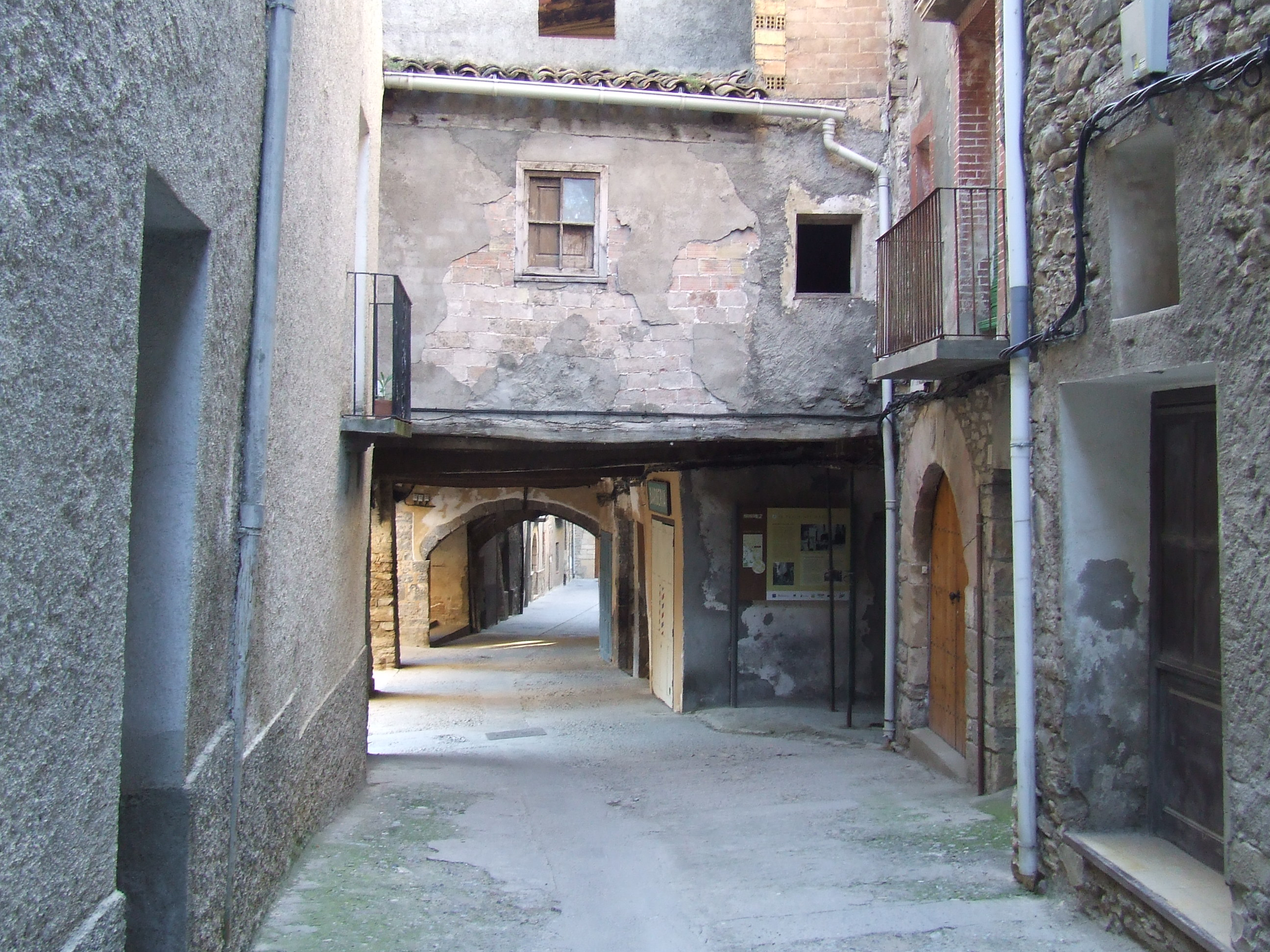 El carrer de Sant Cebrià Alt amb el Portal de la Solana (Salàs de Pallars, Pallars Jussà)